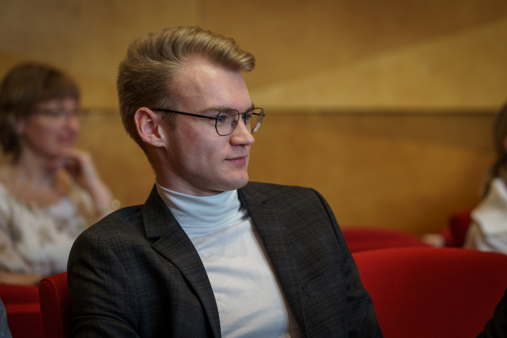 Foto: William Ilmari Ulvinen